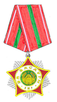 PMR state order